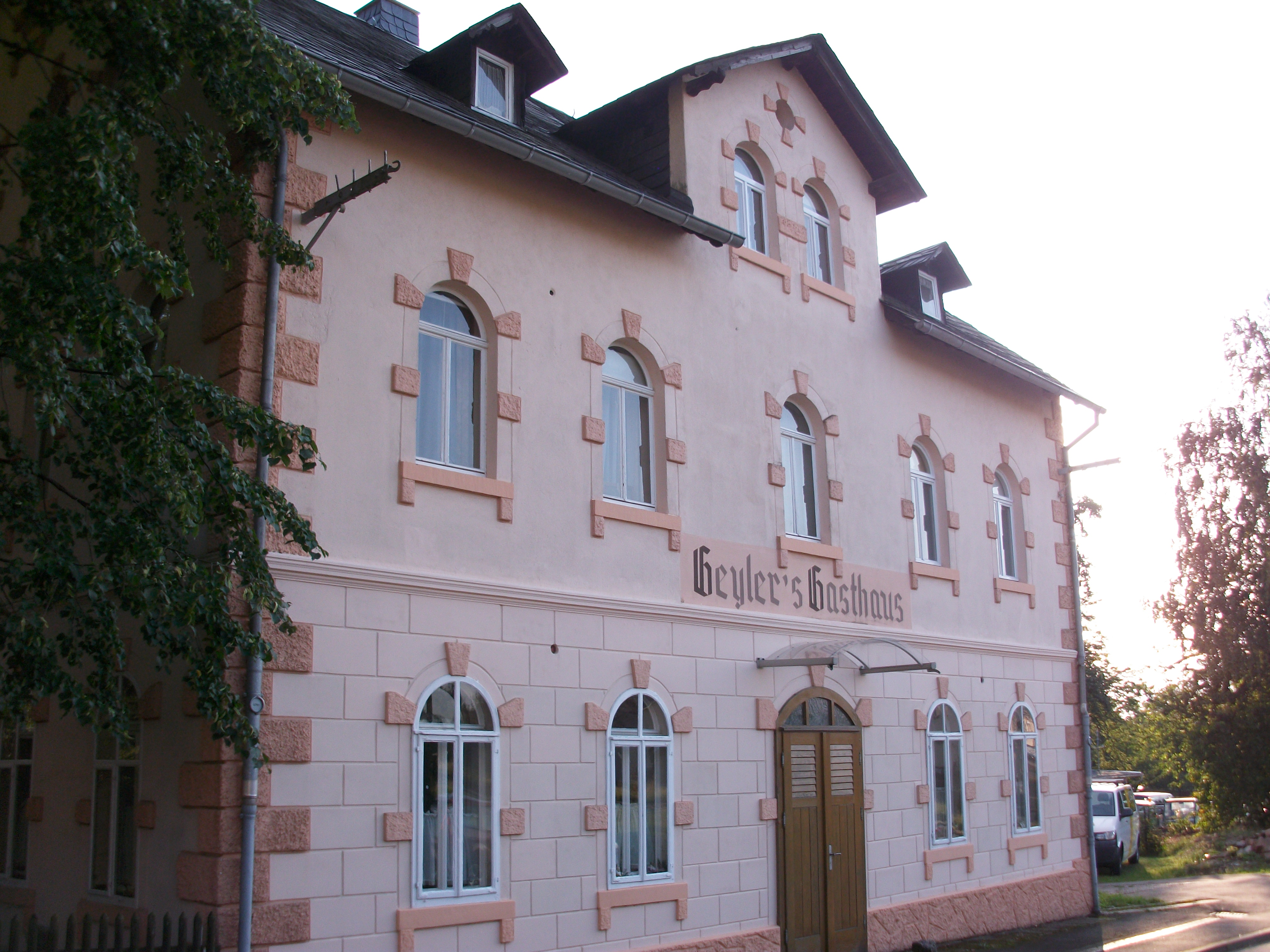 Meinsdorf, Geylersches Gasthaus